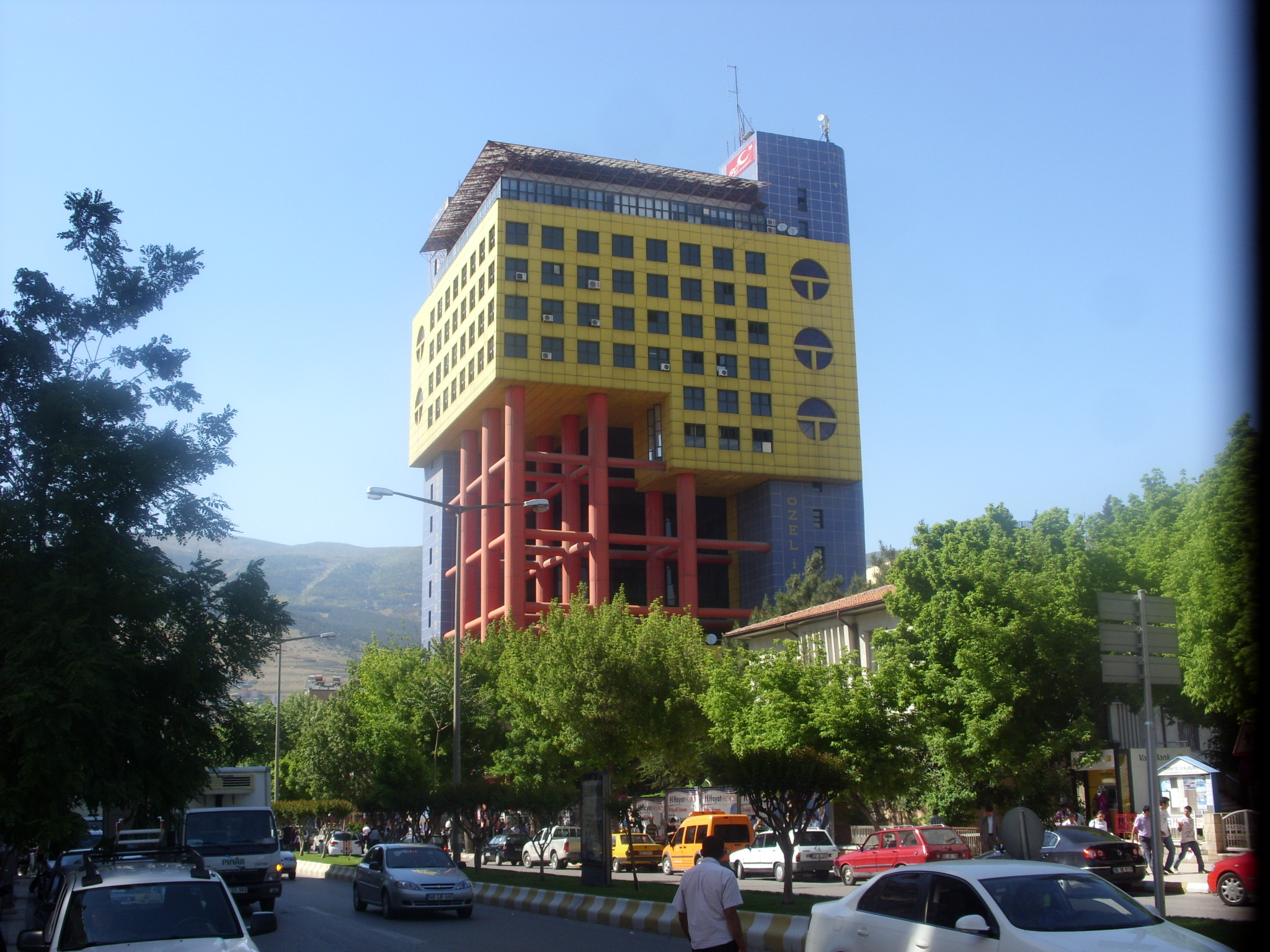 Özel İdare